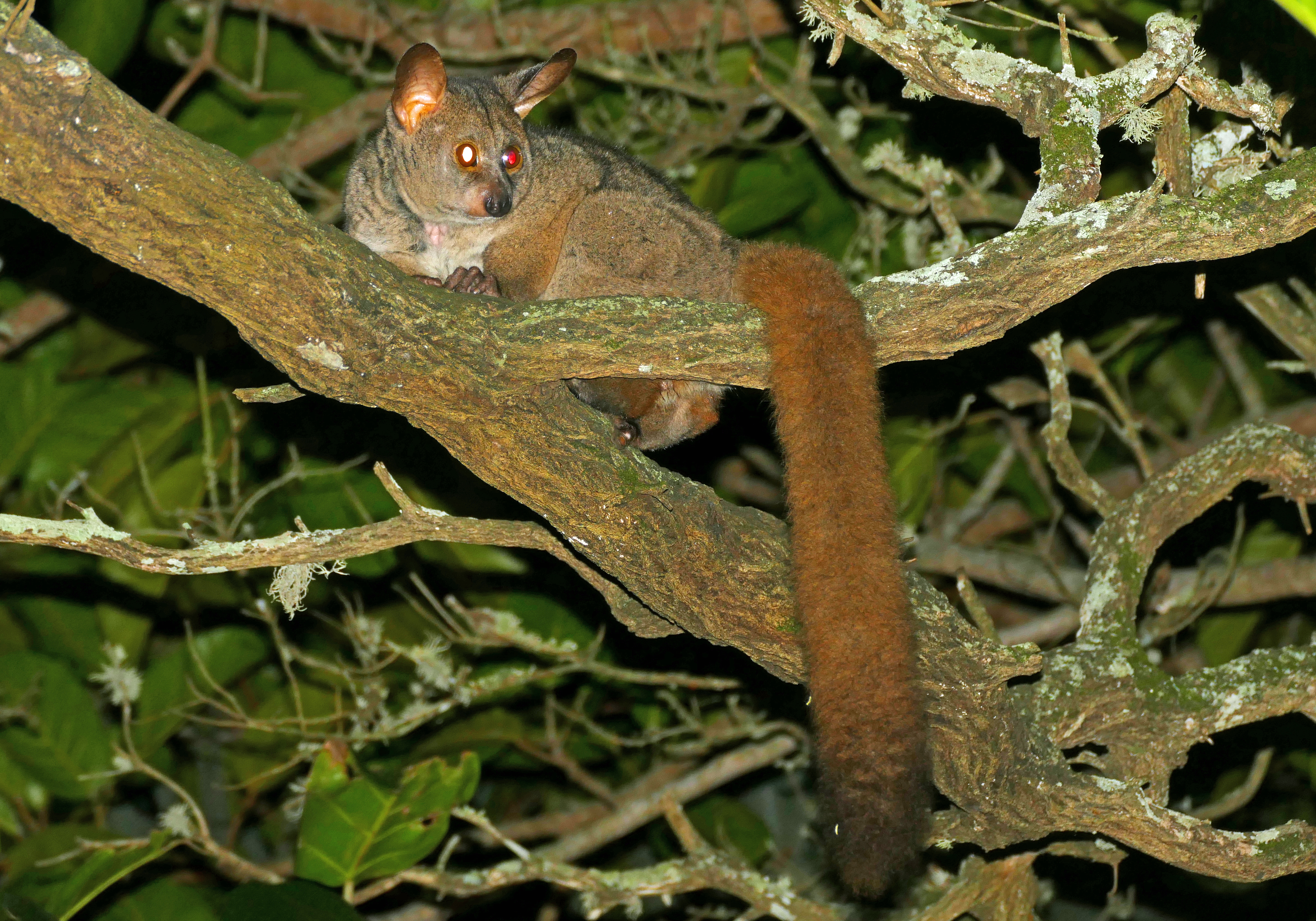 Isinkwe Backpackers Bush Camp, Hluhluwe, KwaZulu-Natal, SOUTH AFRICA